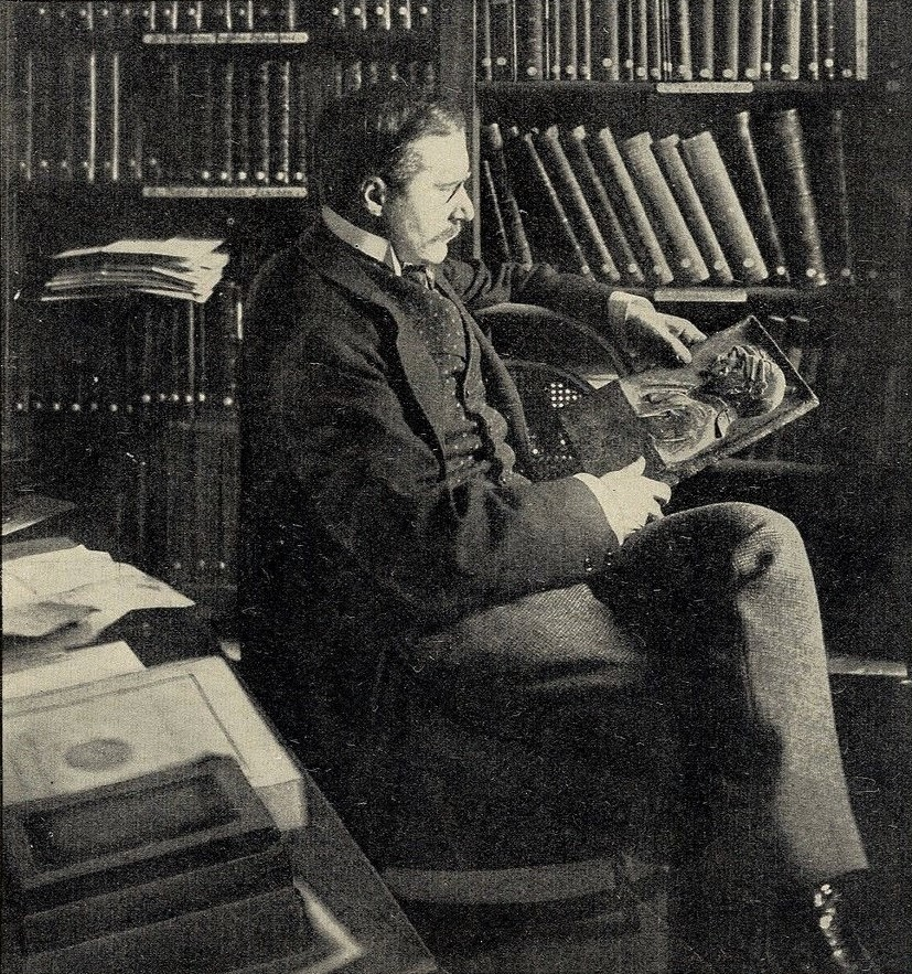 Prof. Dr. Hugo von Tschudi, Direktor der Kgl. Nationalgalerie zu Berlin, 1903